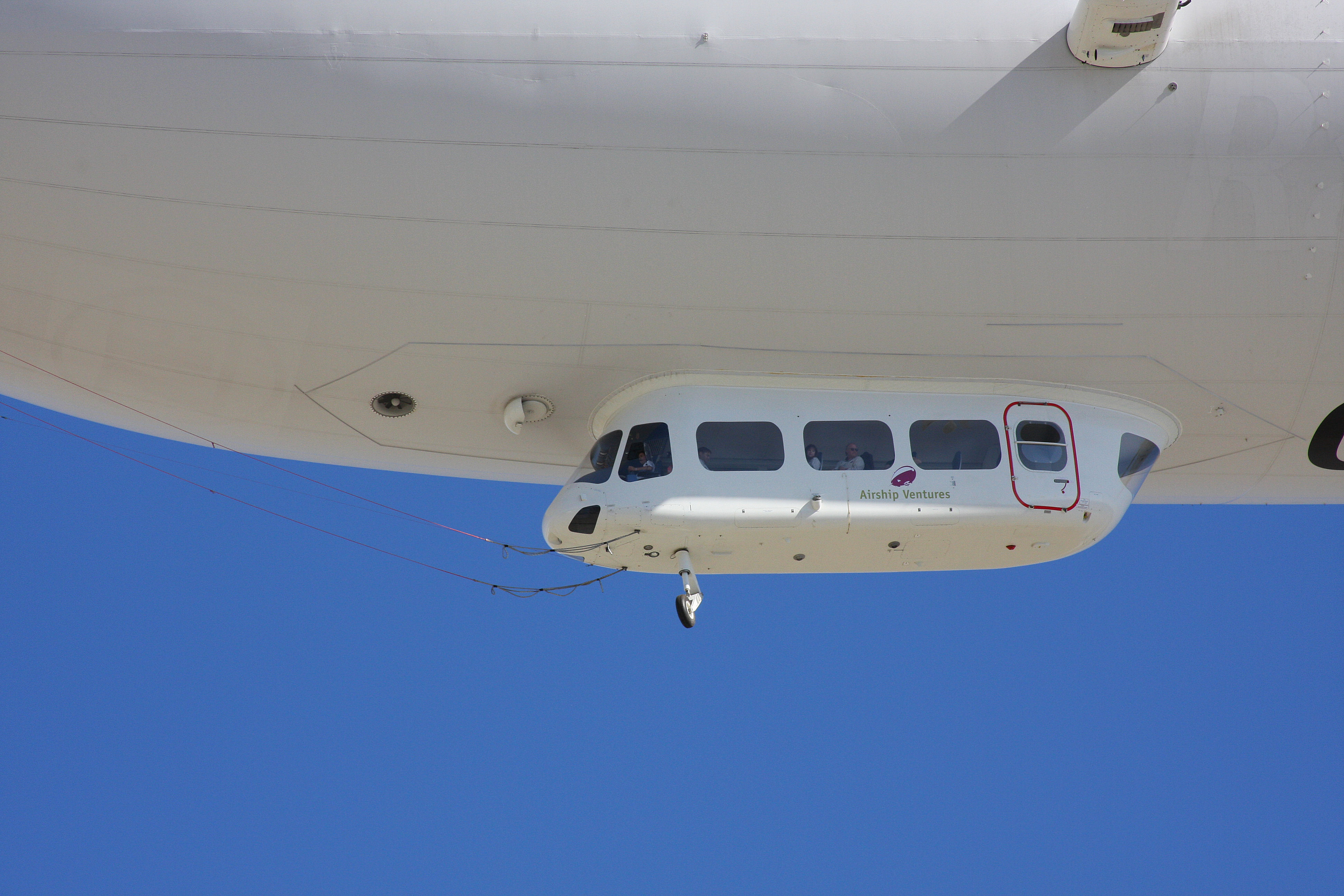 Gondel des in Kalifornien eingestetzen Zeppelin NT